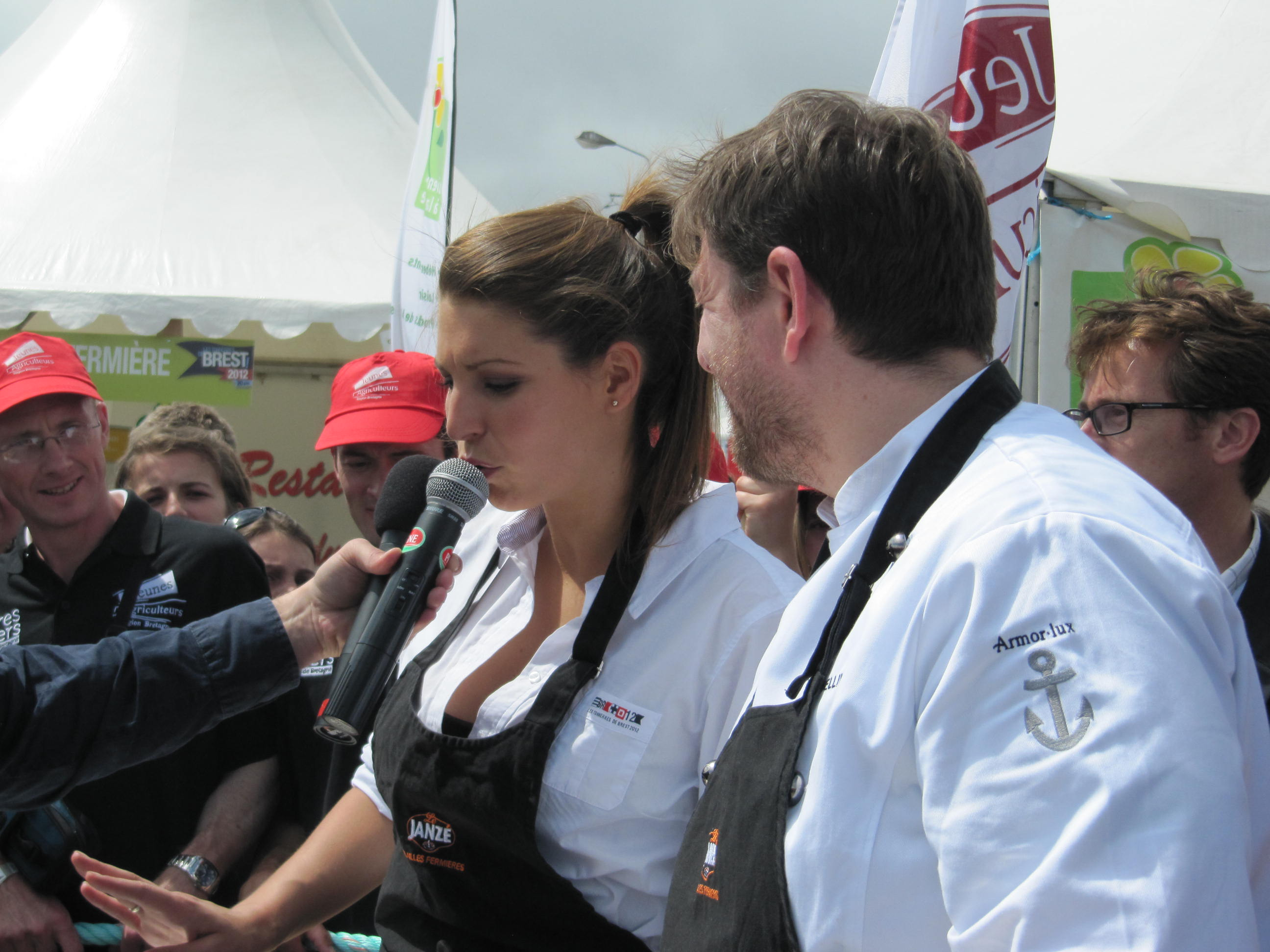 Laury Thilleman, Miss France 2011, Nolwenn Leroy et les Frères Morvan sur le village Terres et mers de Brest 2012